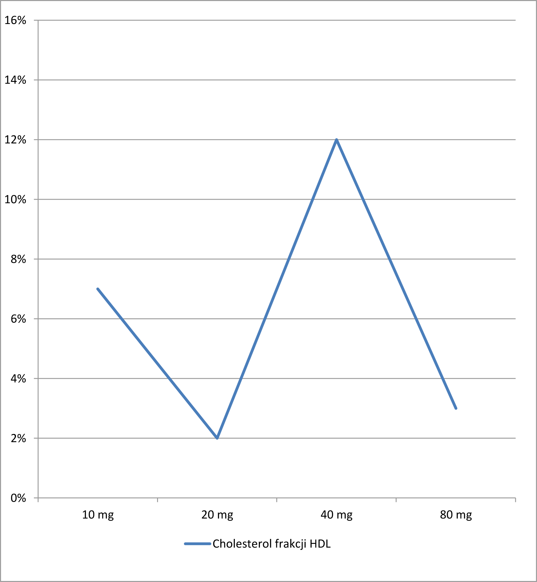 Wpływ prawastatyny na wskaźniki lipidowe (dane do wykresu za PRAVACHOL (pravastatin sodium) Tablets)